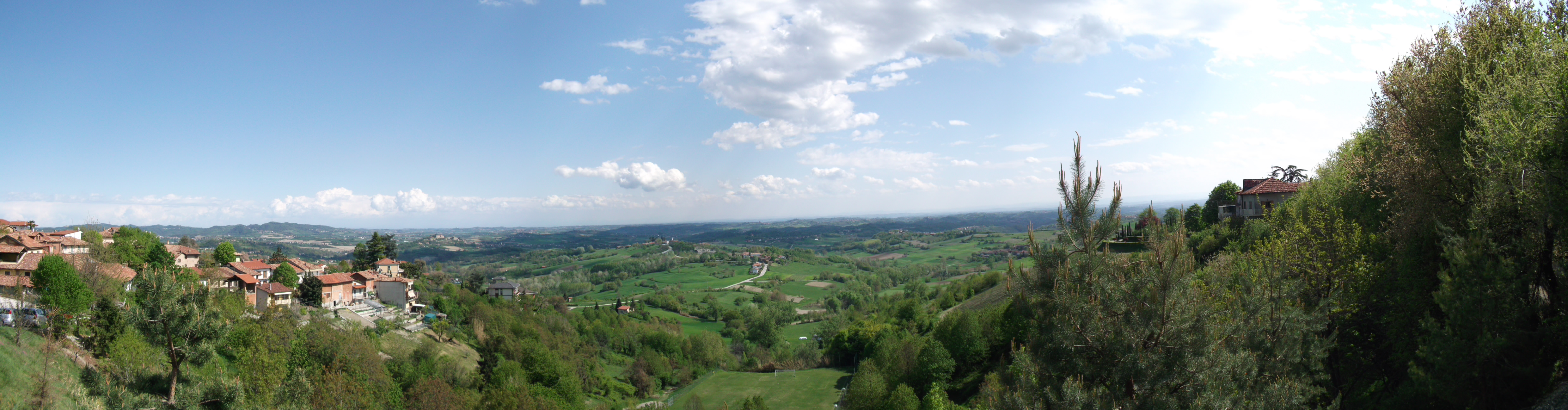 Comune di Cocconato, Panorama sul Basso Monferrato